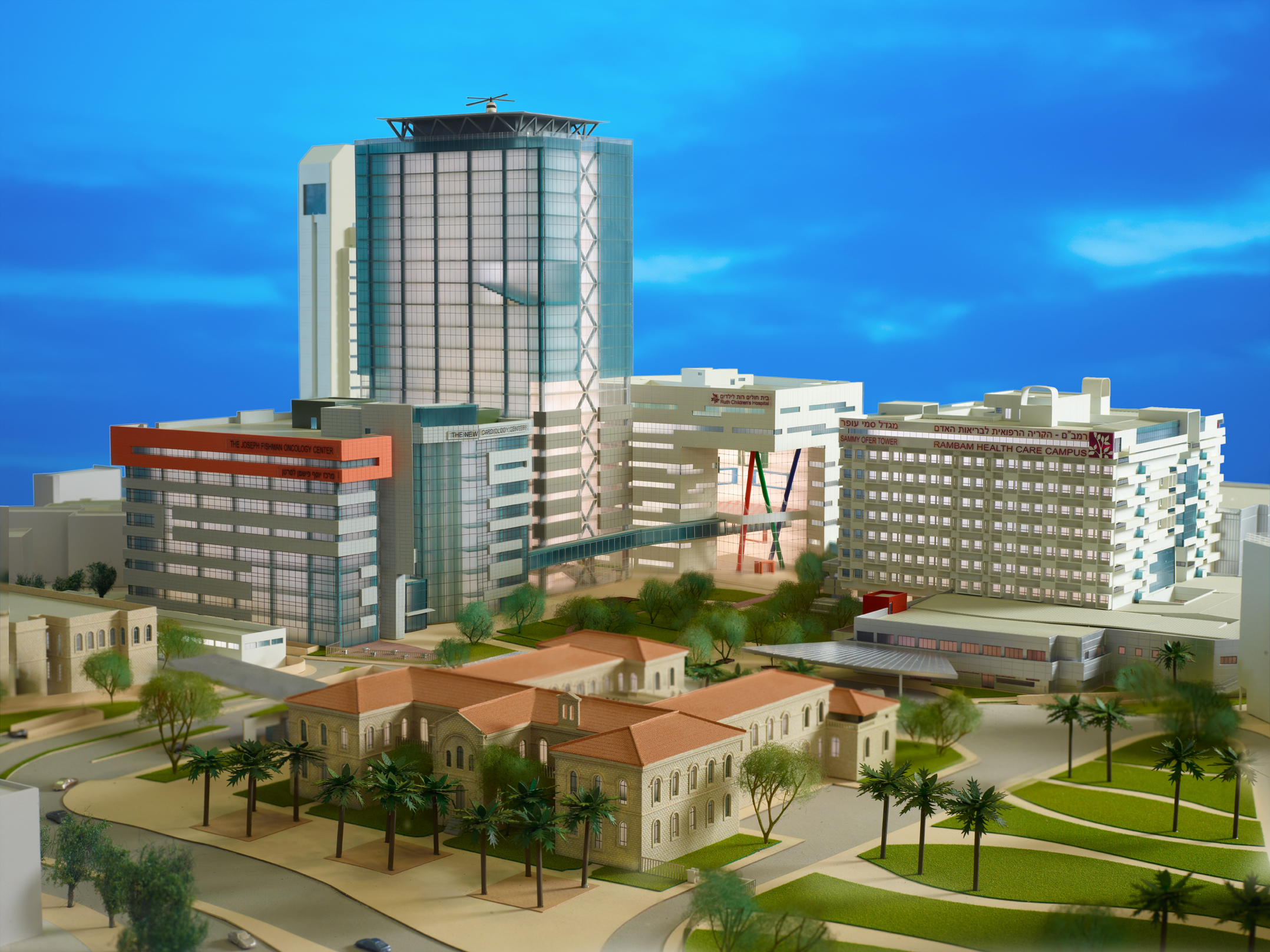 מודל הקמפוס של בי"ח רמב"ם